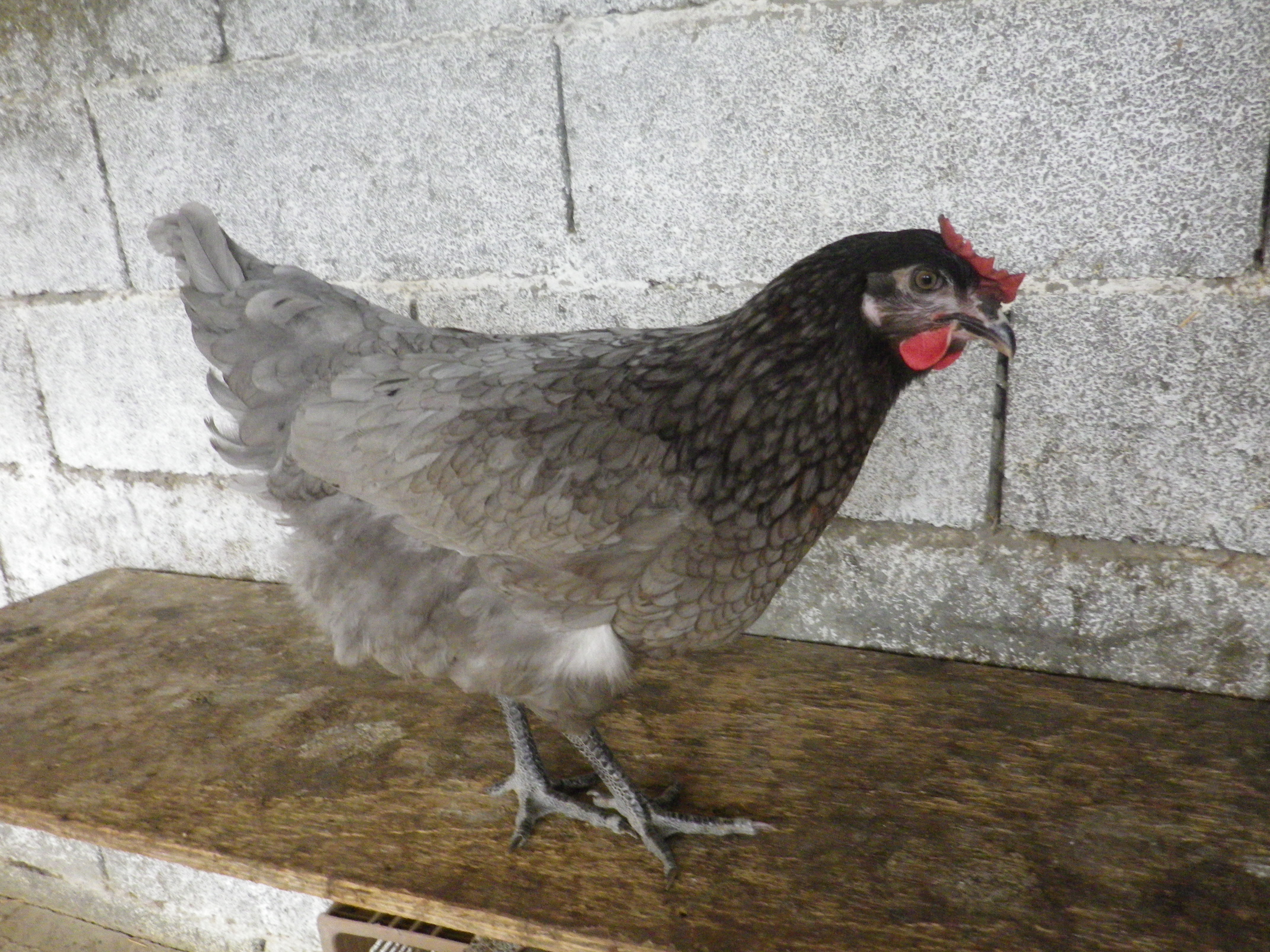 Poule Bleue de France